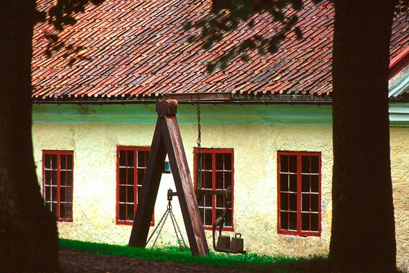 Engelsbergs bruk - Schmiede